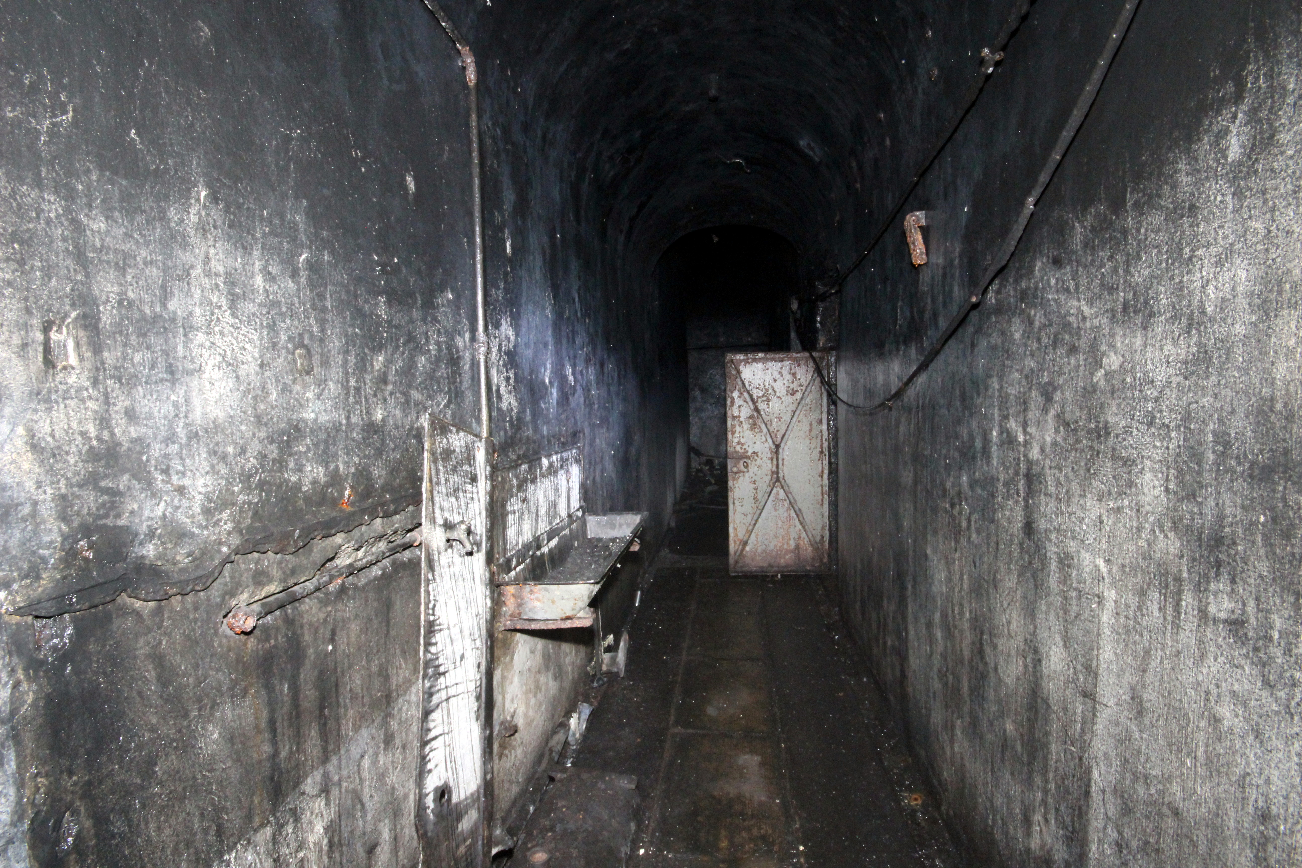 Les Lavabos de l'ouvrage de la Cave-à-Canon